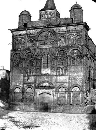 Cathédrale St-Pierre à Angoulême. Mission héliographique